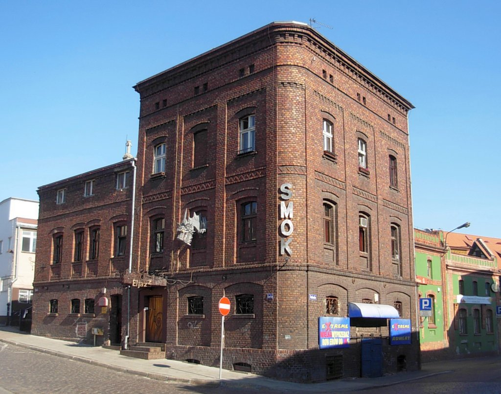 Kamienica na rogu ul. Podwale i Krętej. Klub Eljazz